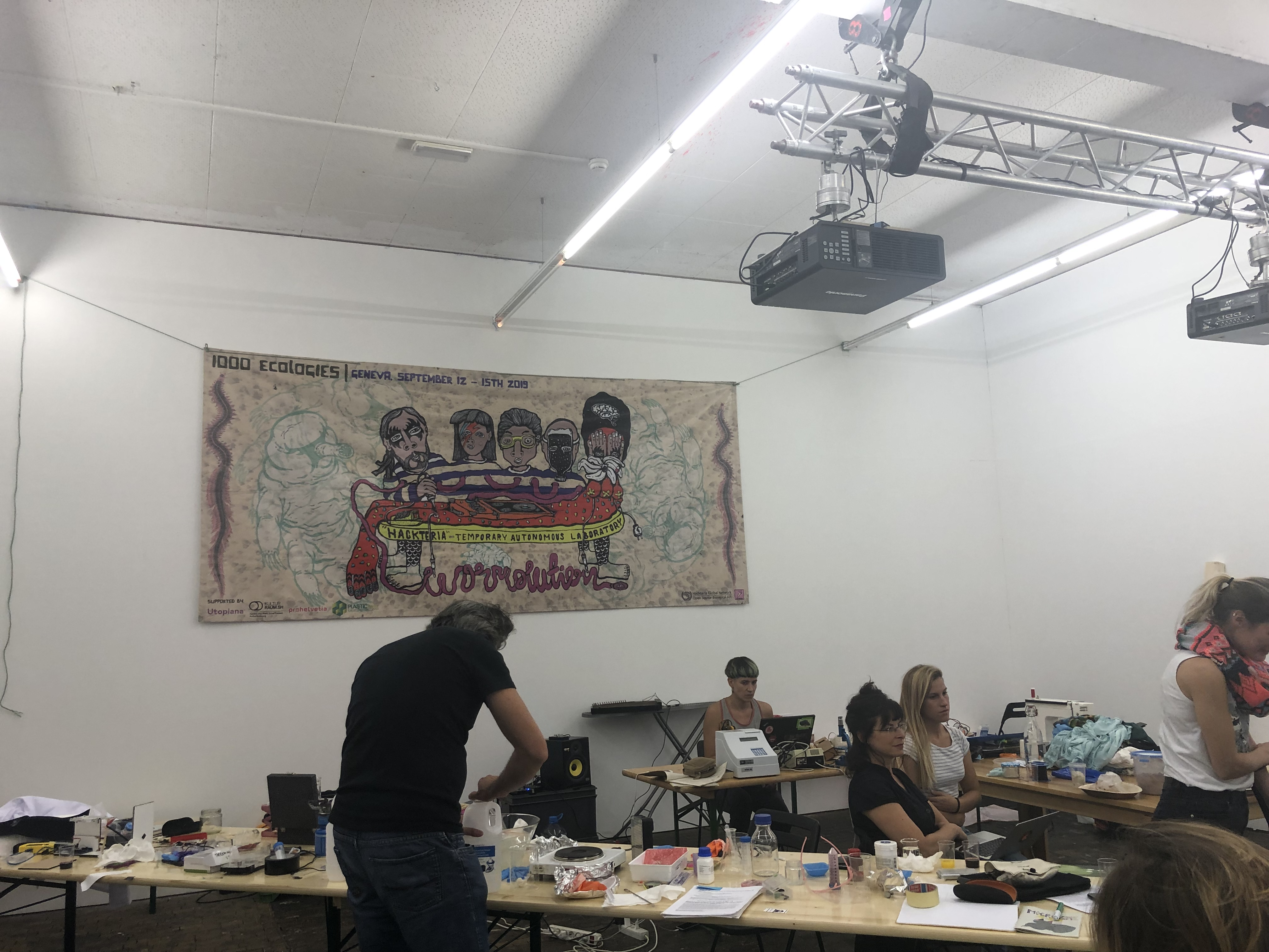 Wormolution, 1000 écologies 12 au 15 septembre 2019